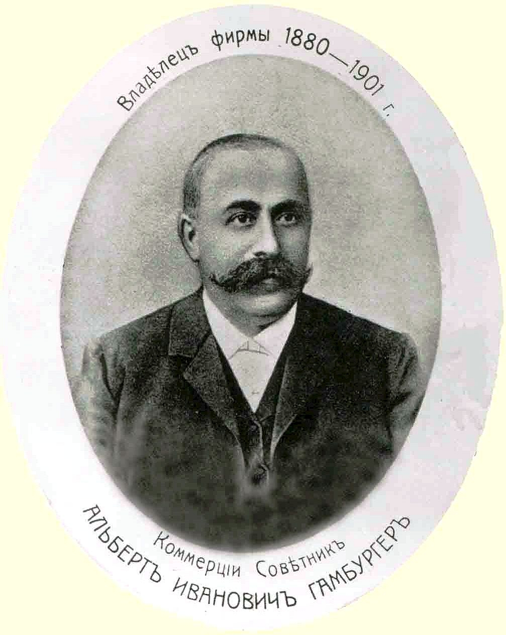 Гамбургер Альберт Иуванович